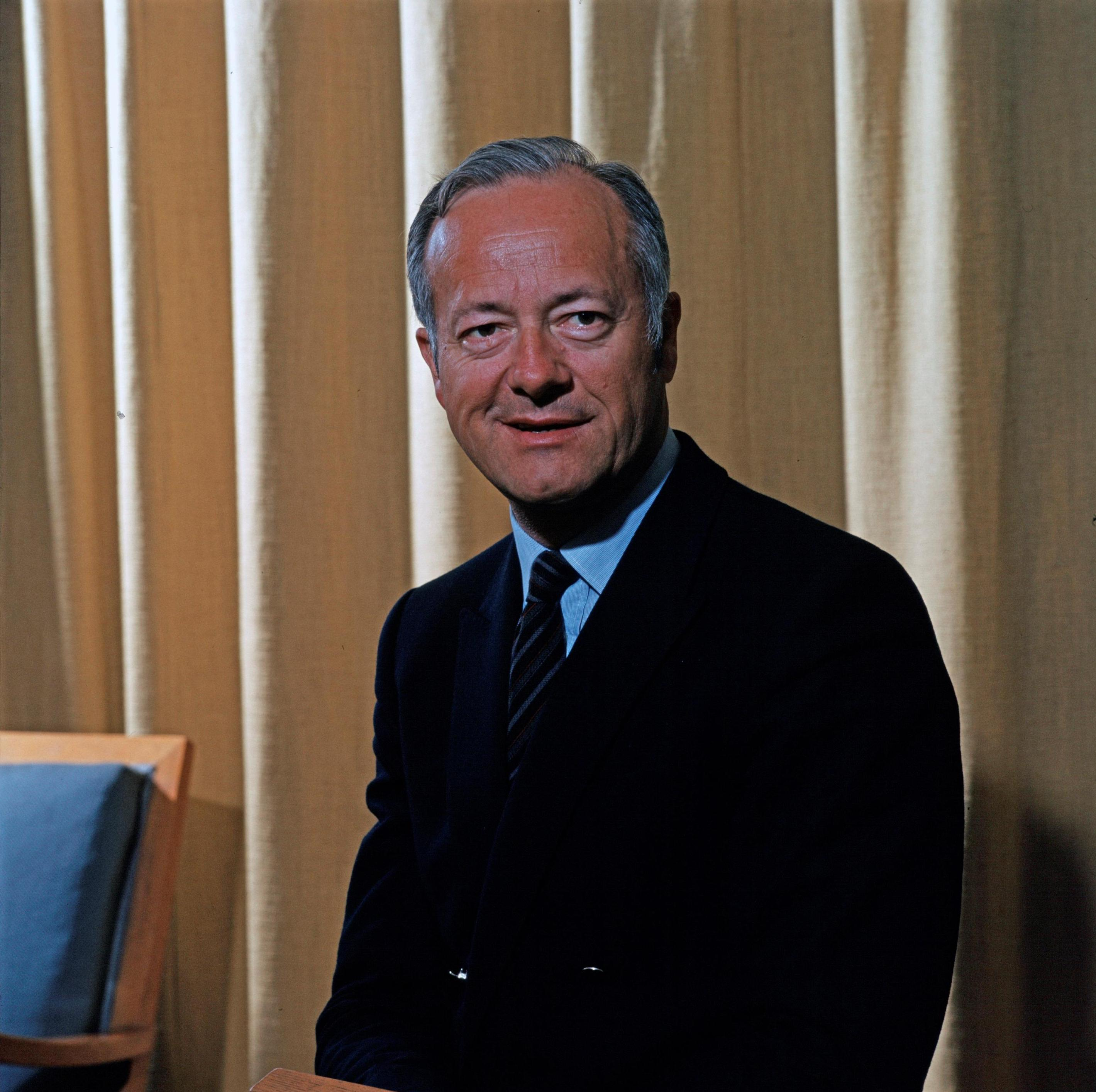 Elmar Rümmele war Landesrat in der Vorarlberger Landesregierung von 1974 bis 1984. Dies ist eine offizielle Portraitaufnahme aus dem Februar 1981.